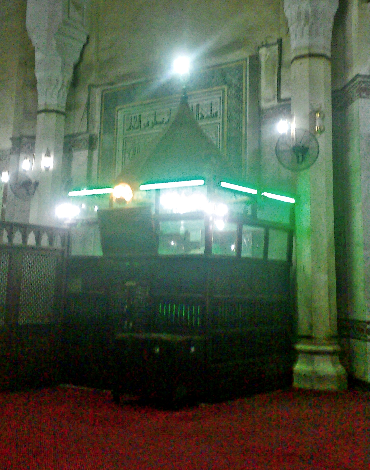 ضريح الإمام شرف الدين أبي العمران موسى بمسجد سيدي إبراهيم الدسوقي، بمدينة دسوق، مصر